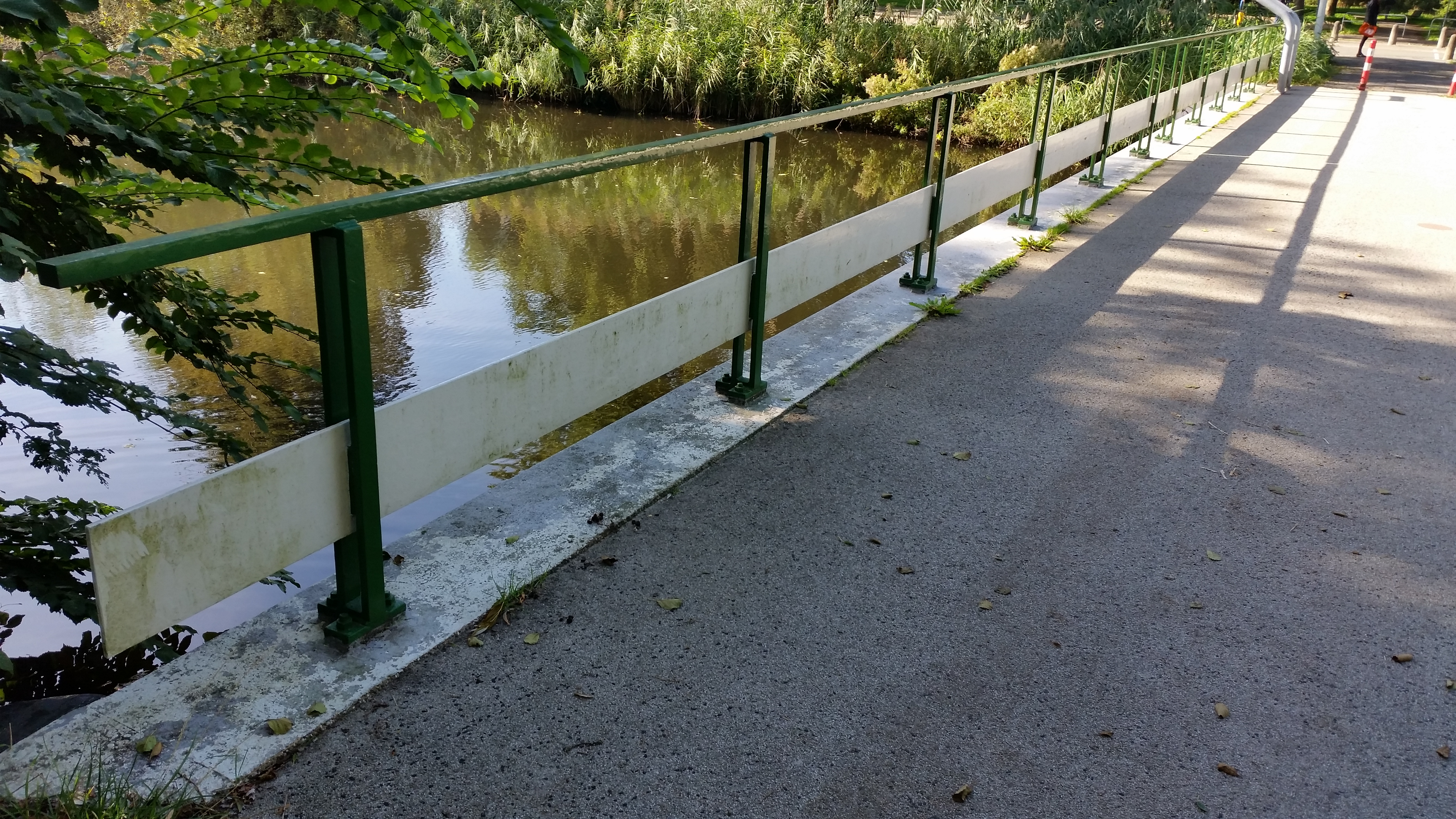 Brug 815 (in Amsterdam), leuning